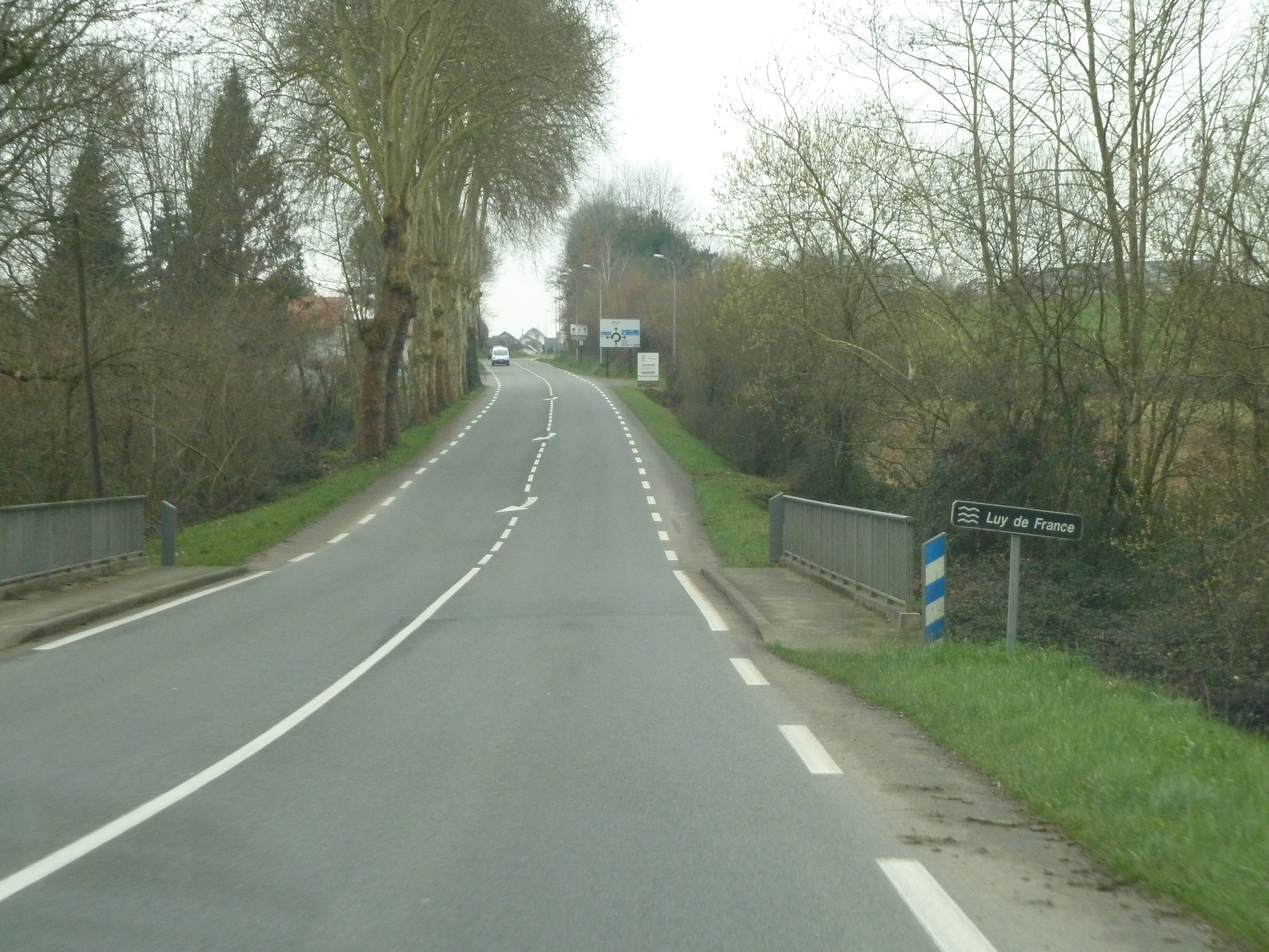 Le luy de France au niveau de la limite entre Saint-Jammes et Morlaàs